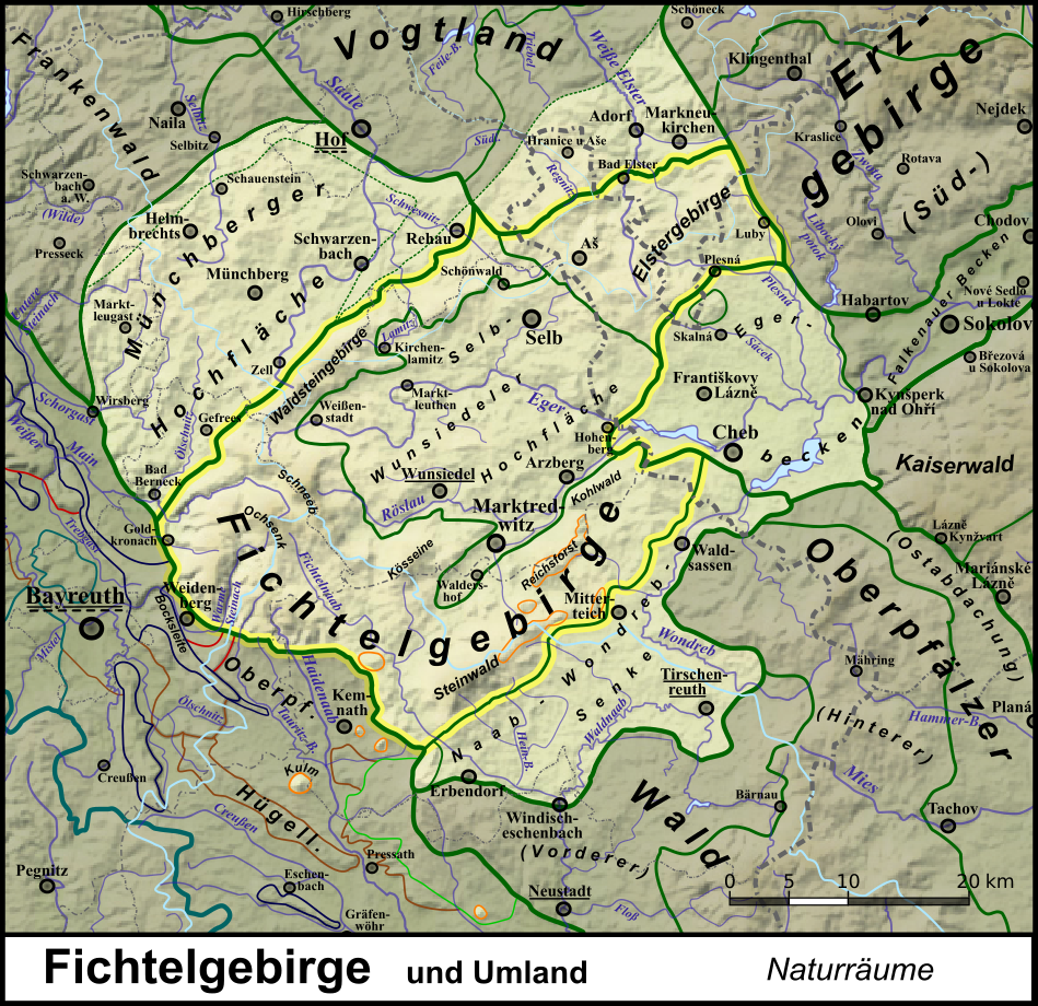 Naturraumkarte des Fichtelgebirges nebst Selb-Wunsiedeler Hochfläche und Elstergebirge sowie den angrenzenden Landschaften Naab-Wondreb-Senke, Münchberger Hochfläche und Egerbecken. Aufgehellt sind überdies die geologisch Fichtel- und Erzgebirge entsprechenden Teile des Oberen Vogtlandes sowie, im südwestlich anschließenden Oberpfälzischen Hügelland, die Basaltkuppen Rauher Kulm (681 m), Schloßberg| (641 m), Parkstein (595 m) und Anzenberg (593 m).Die Zuordnung des Elstergebirges zum Fichtelgebirge entstammt, ähnlich wie die relativ schmale Eingrenzung des Nordostteils der Naab-Wondreb-Senke, Schönfelder (2008).